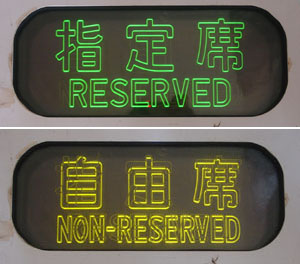 slimline